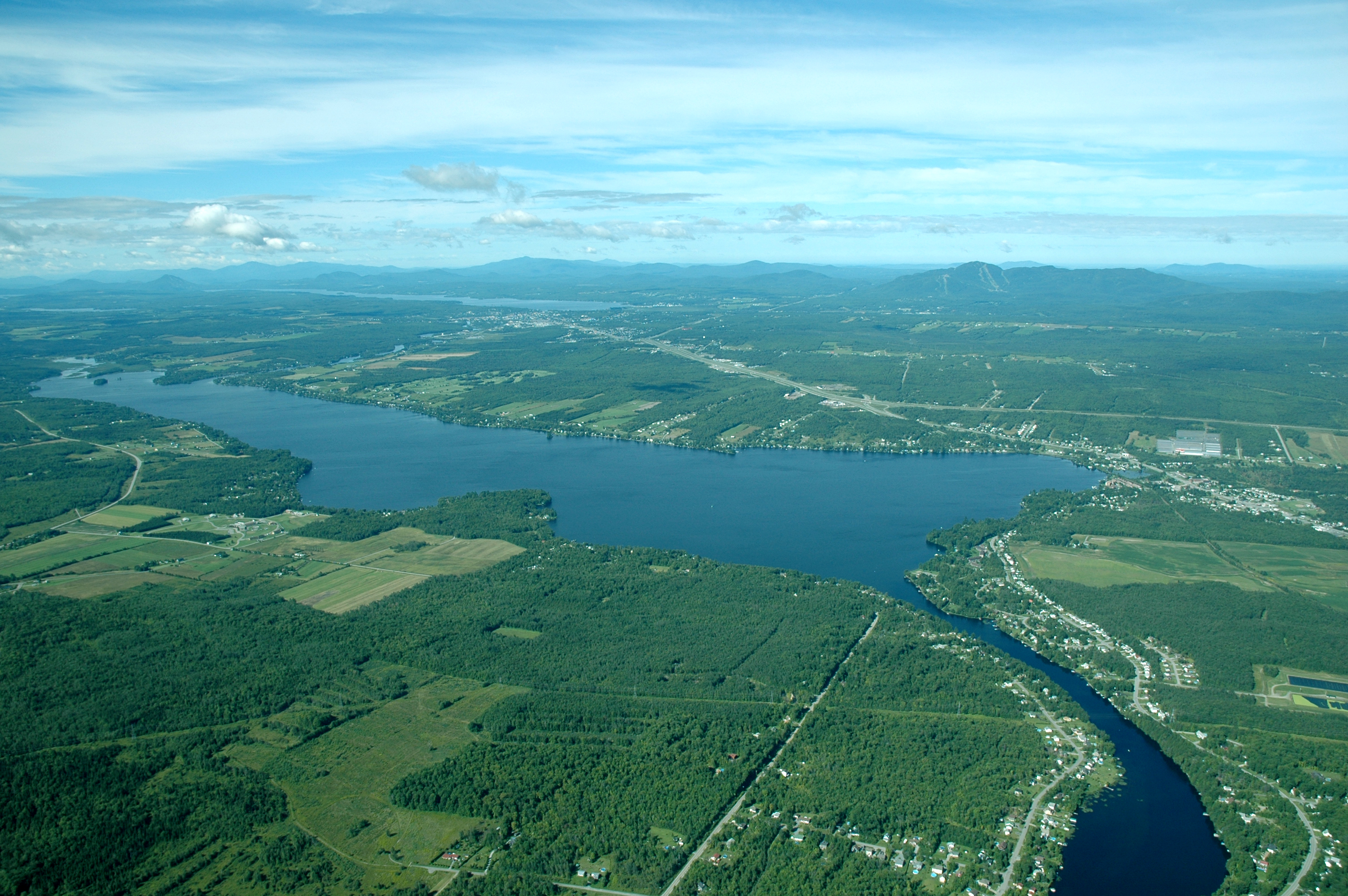 Vue aérienne du lac Magog